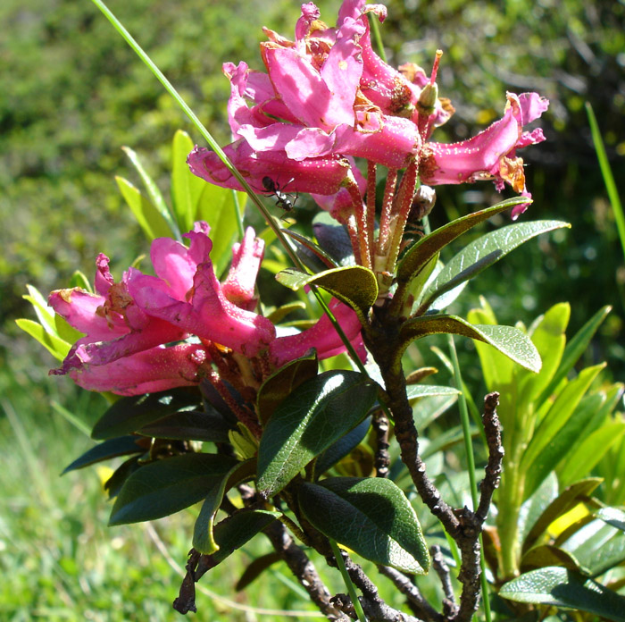 Alpenrose mit Ameise Fotografiert am: 28.Juli 2004 auf der Belalp Copyright Status: GNU Freie Dokumentationslizenz